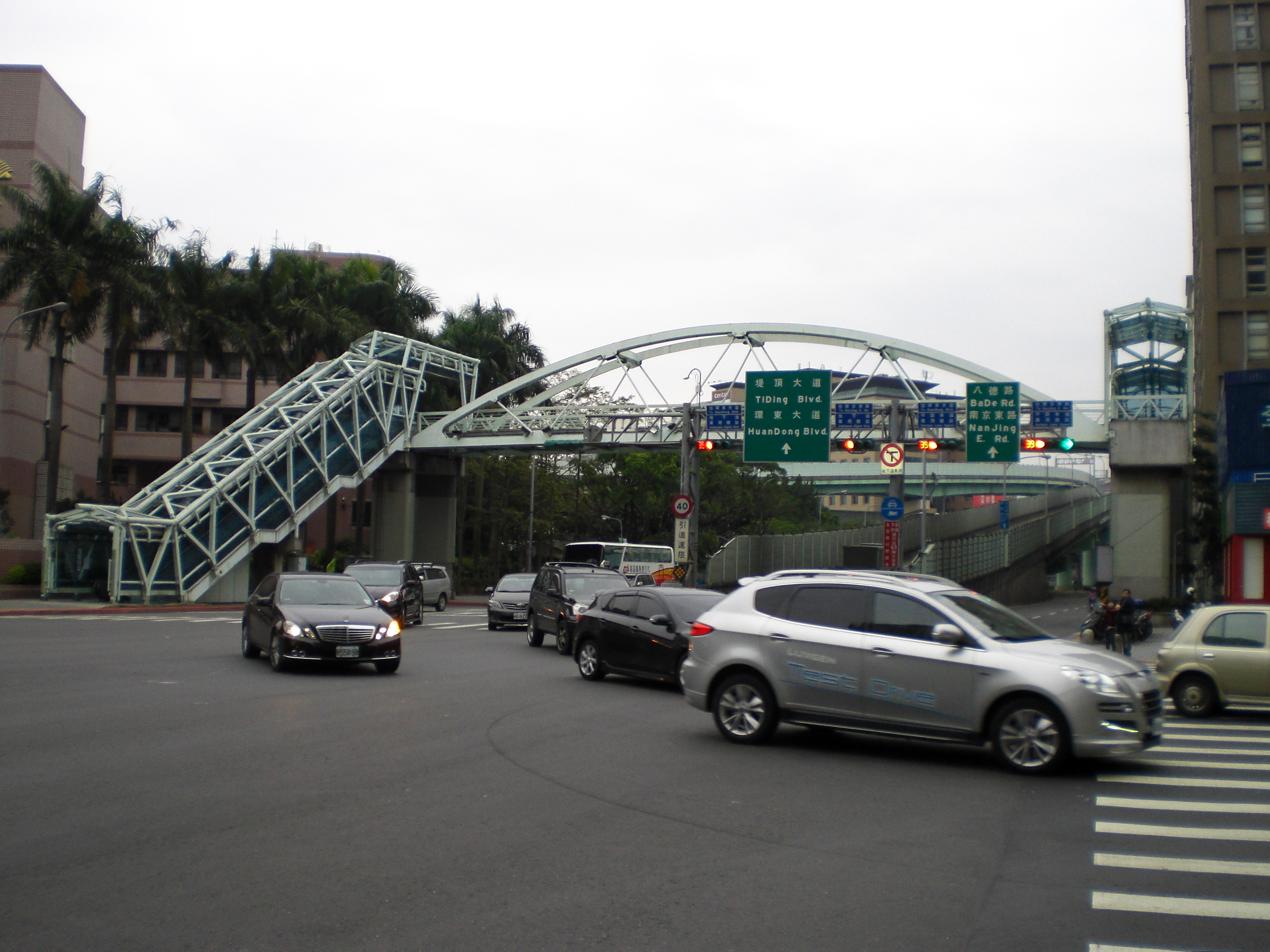 臺北市立松山高級中學人行天橋，橫跨基隆路。往右為松隆路，往左為松山高中大門。